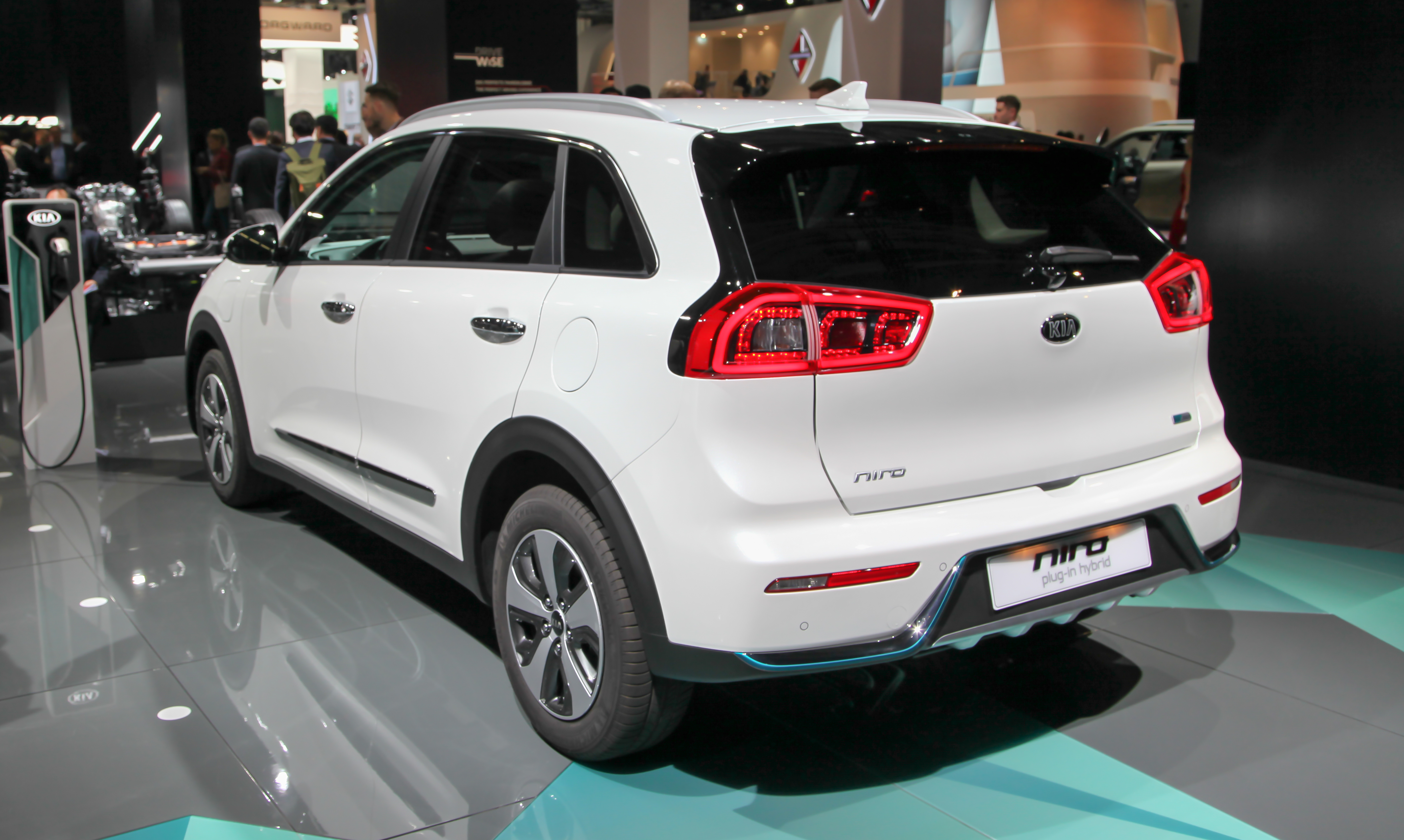 Kia Niro PHEV